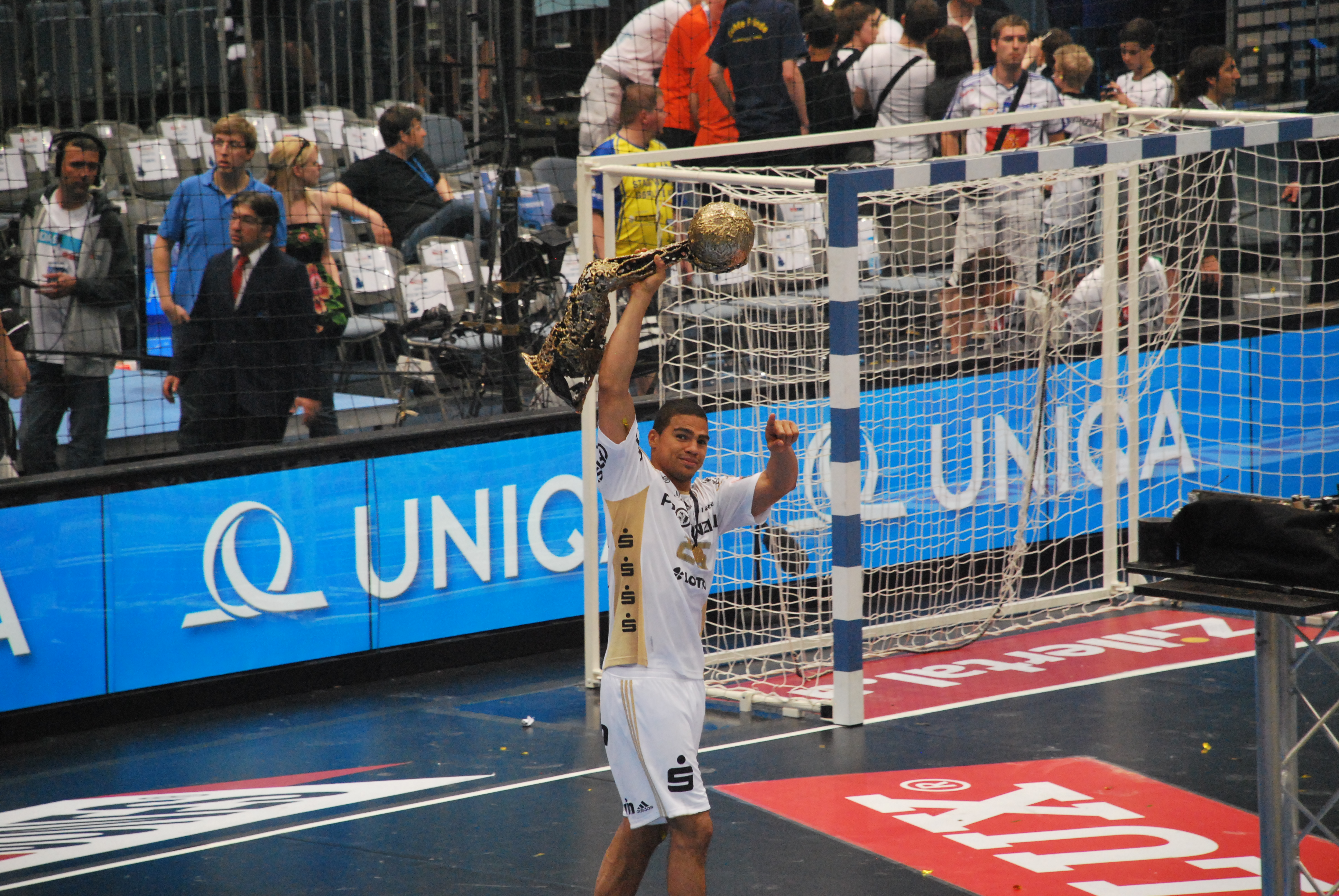 Daniel Narcisse mit der EHF Champions League Trophäe